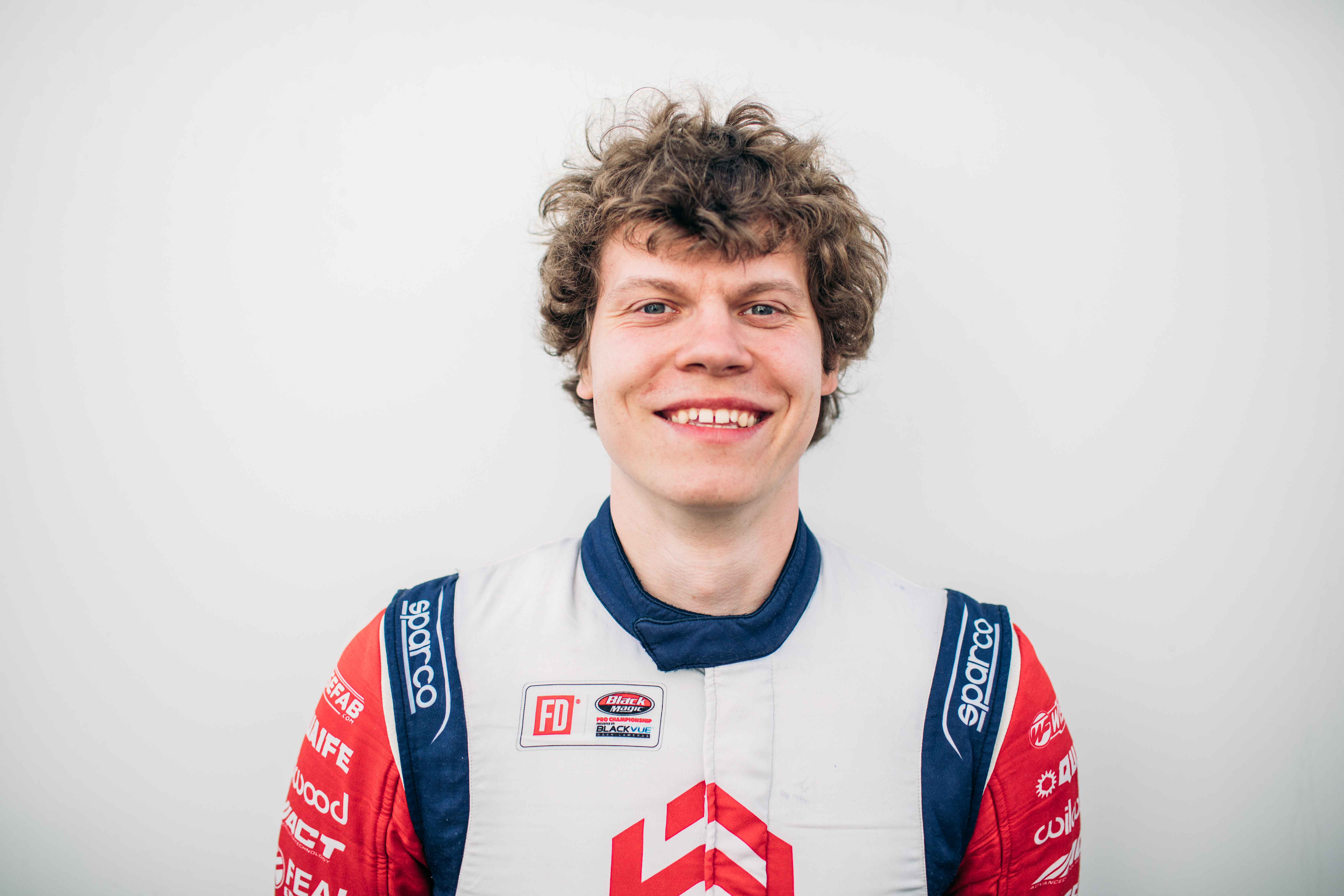 Piotr Więcek, polski drifter, zawodnik Worthouse Drift Team